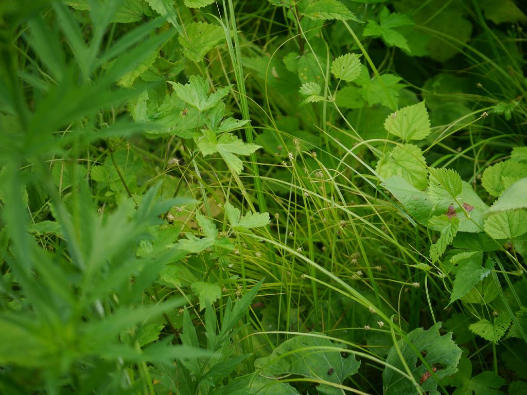 Carex uda：エゾハリスゲ 2018/06/24 北海道・釧路／Kushiro, Hokkaido, Japan